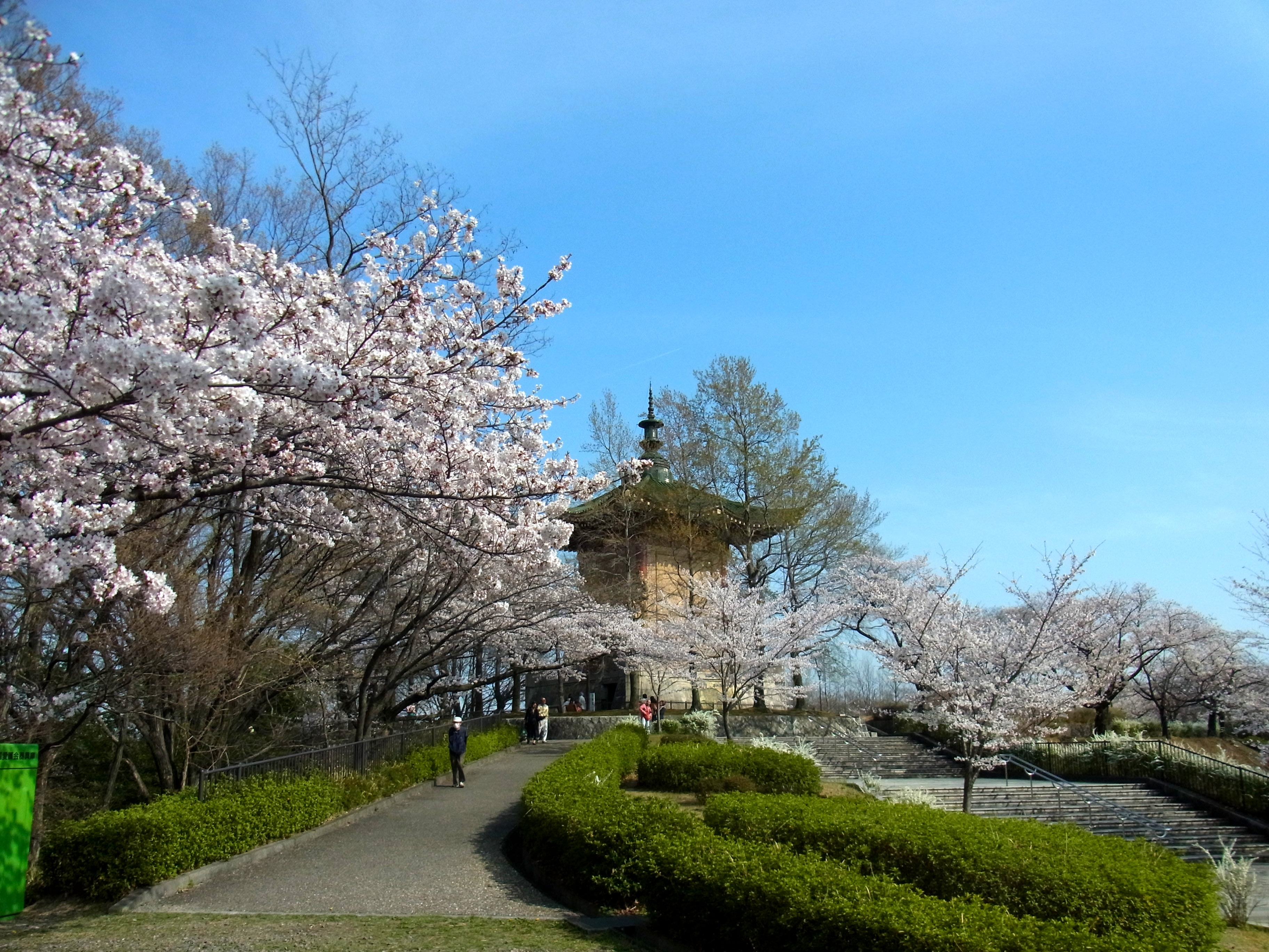 平和公園の桜